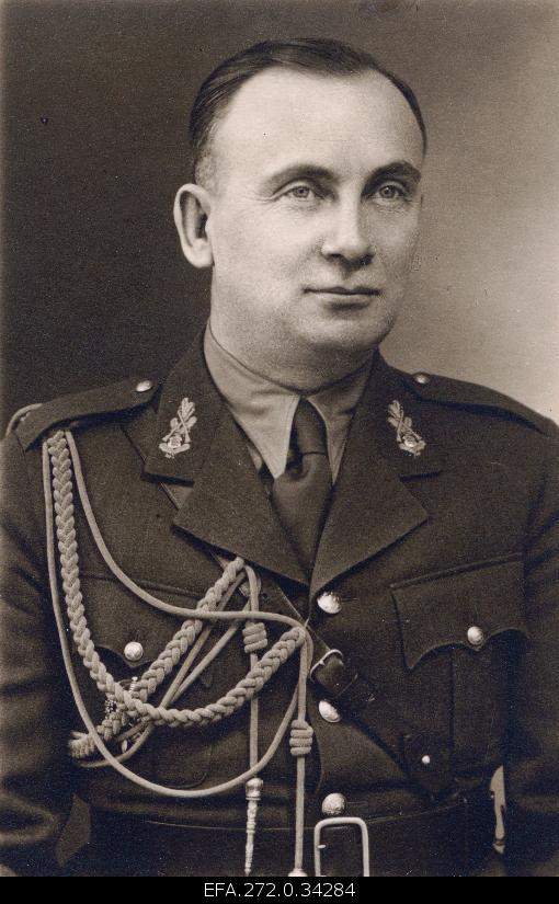 Eesti Vabariigi Sõjavägede Staabi VI (väljaõppe) osakonna ülem major Alfred Luts 1938. aastal.